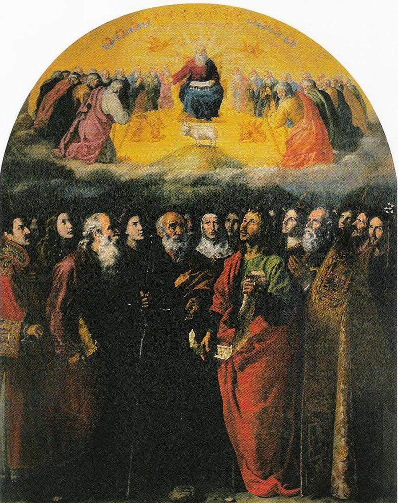 La obra muestra a Jesucristo siendo adorado como el Cordero místico o Agnus Dei, que traducido al castellano viene a decir el Cordero de Dios.